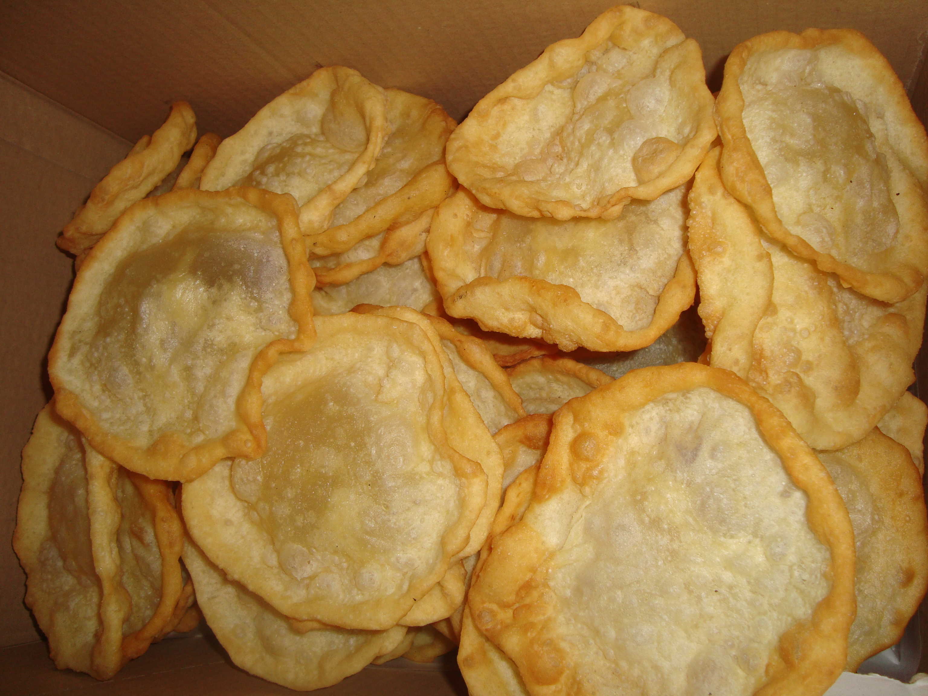 Alosetes (orelletes), gastronomia de les Terres del Maestrat (Comunitat Valenciana)